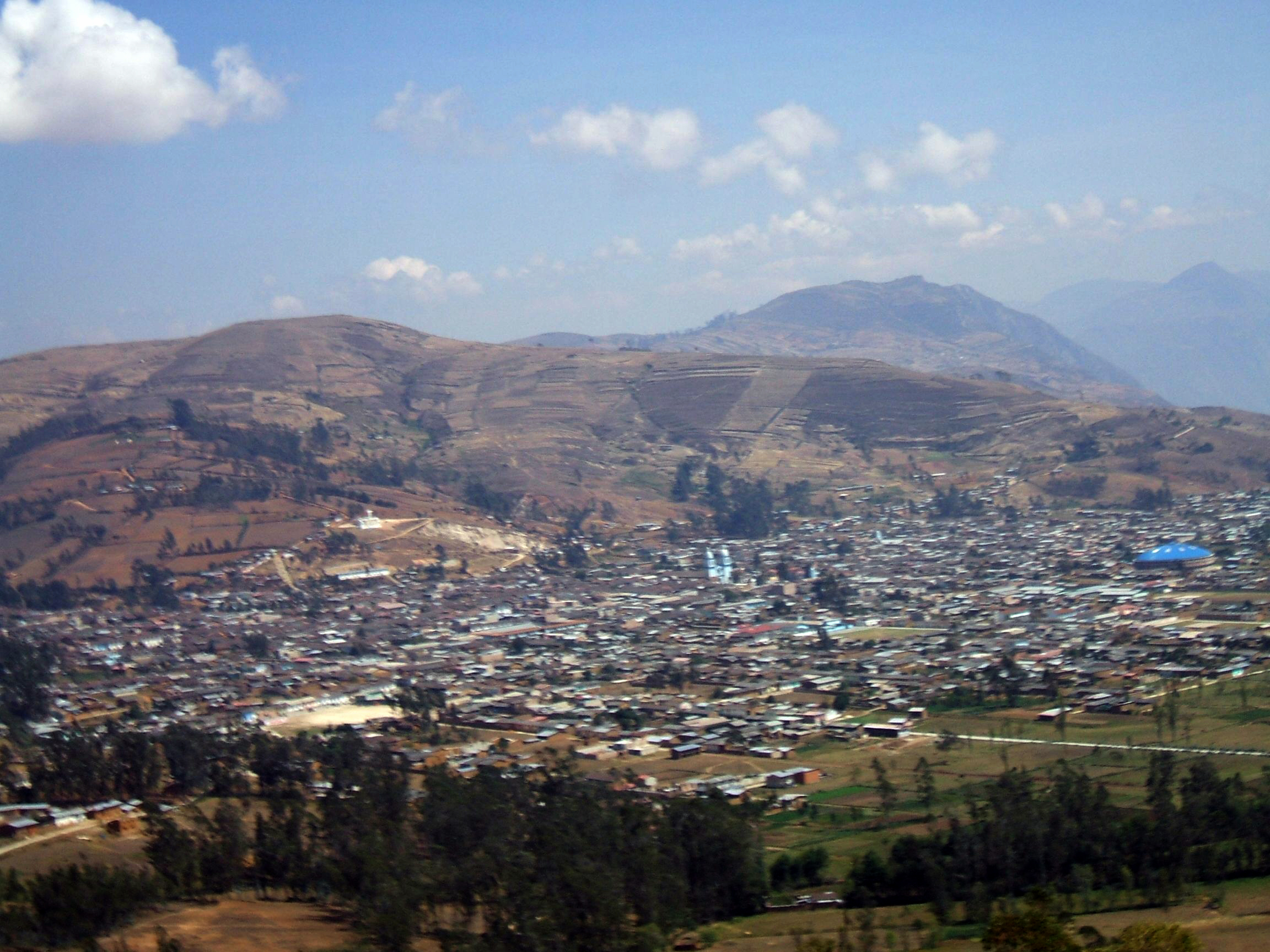 Colores reequilibrados de una foto anteriormente colocada en la página.